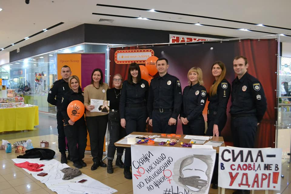 Акція "Не мовчи! Протидій насильству" (Кривий Ріг, 2019 р.)